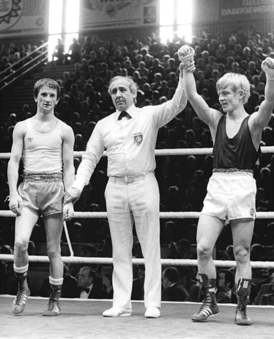 Slawomir Zapart, Klaus-Dieter Kirchstein ADN-ZB Lehmann 13.3.82 Halle: XI. Internationales Boxturnier um den Chemiepokal-Finale - Den Turniersieg im Bantamgewicht erkämpfte sich der dreifache DDR-Vizemeister Klaus-Dieter Kirchstein (rechts). Er bezwang den zweifachen polnischen Landesmeister Slawomir Zapart nach Punkten (3:2-Richterstimmen). Bildmitte Ringrichter Lenzini (Italien).